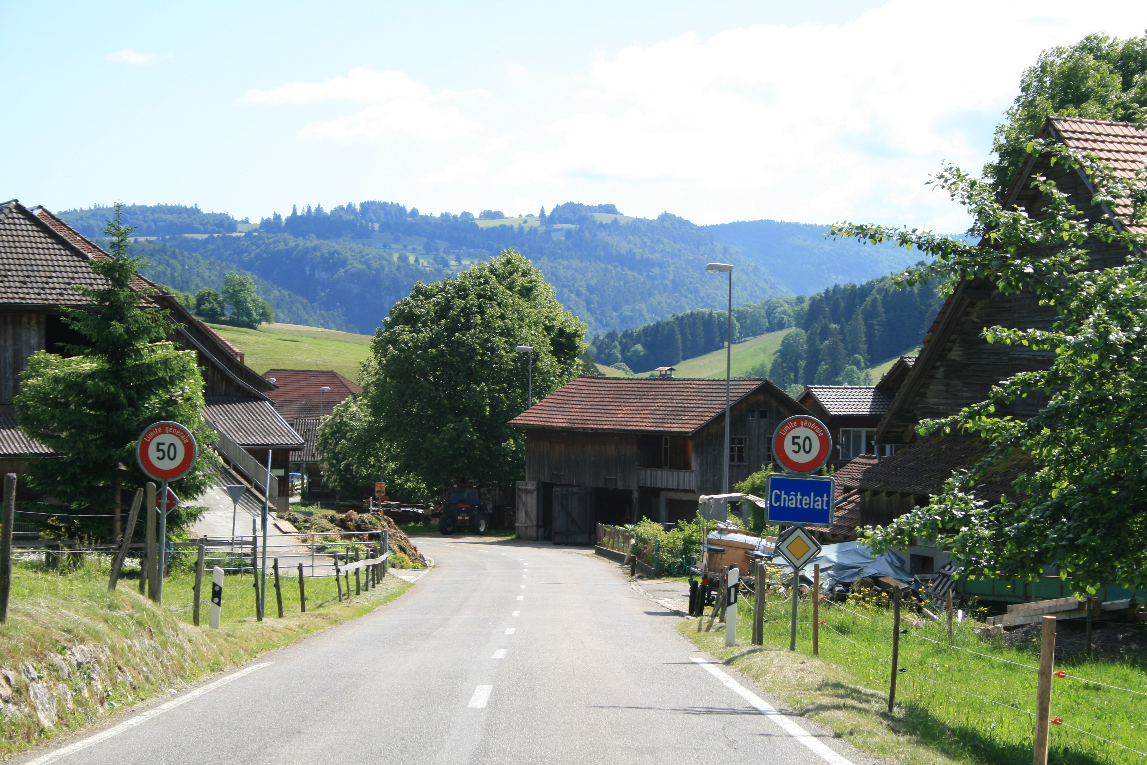 Châtelat